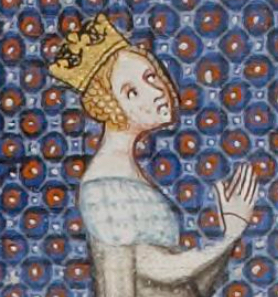 Adèle of Champagne